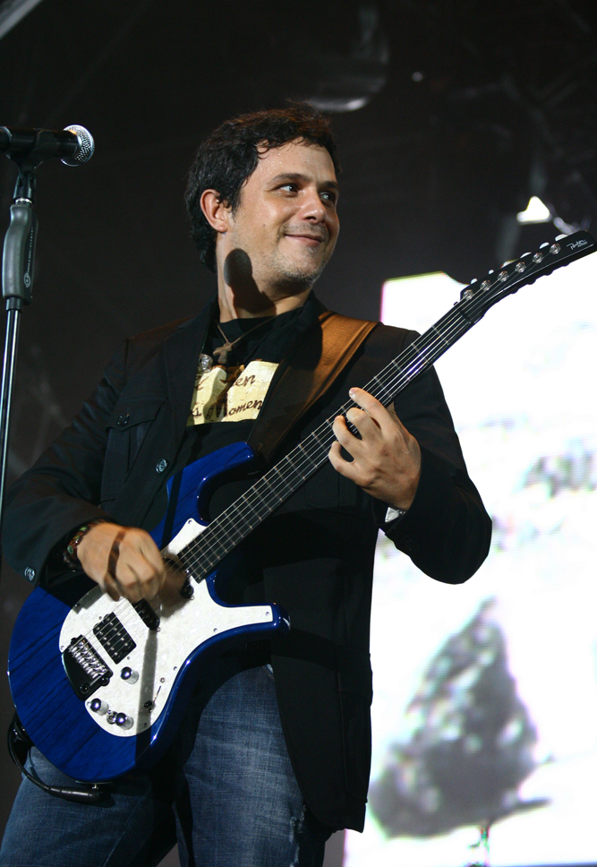 El cantante Alejandro Sanz tocando en Managua, Nicaragua.